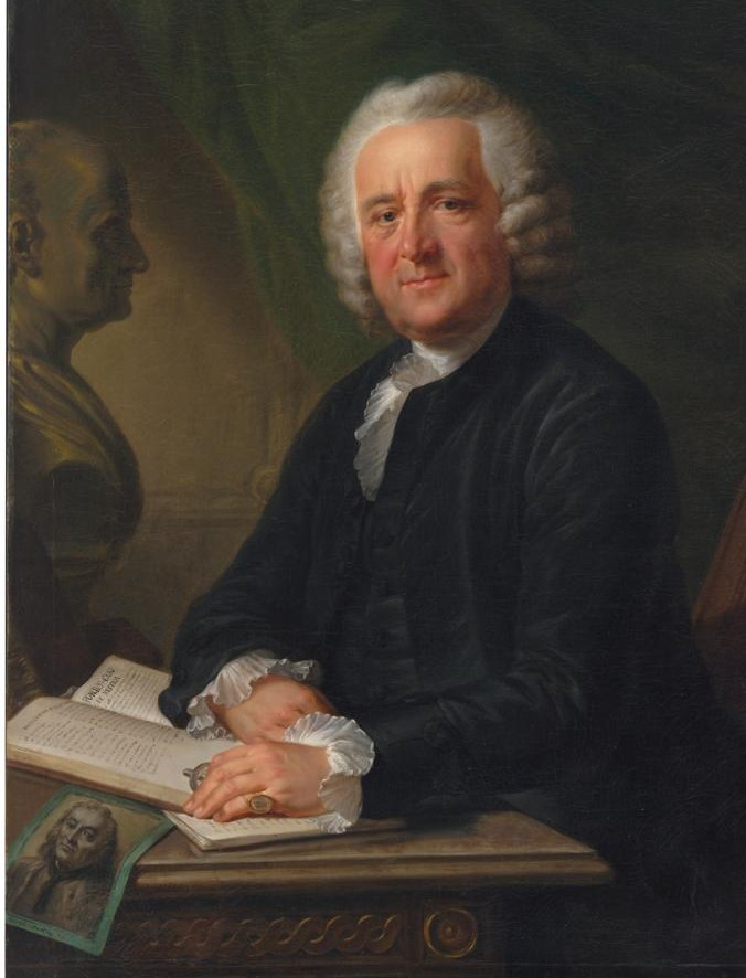 Friedrich Oelenhainz: Porträt von Hans Caspar Hirzel, 1790. Gemälde : Öl auf Leinwand ; Bild 110 x 86,2 cm (hier etwas beschnitten). Zentralbibliothek Zürich, Inv 173.